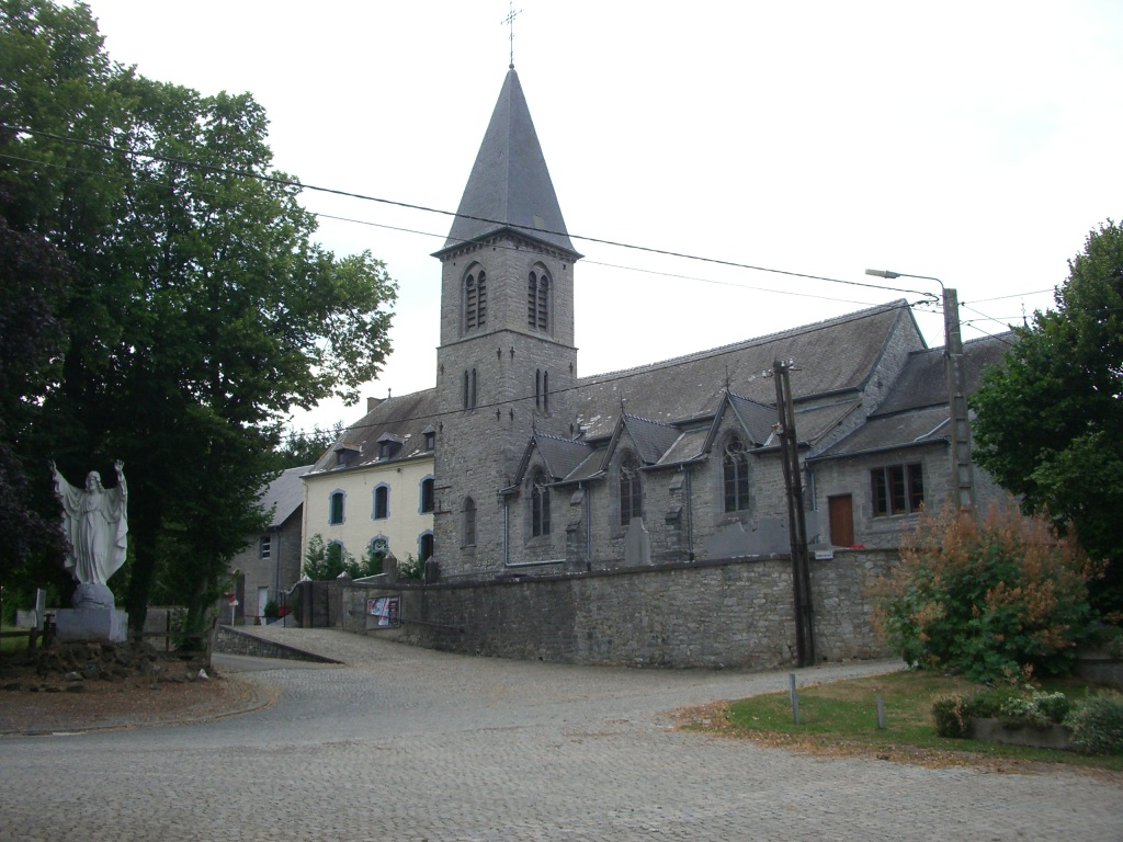 L'église Saint-Hubert de Sommière.